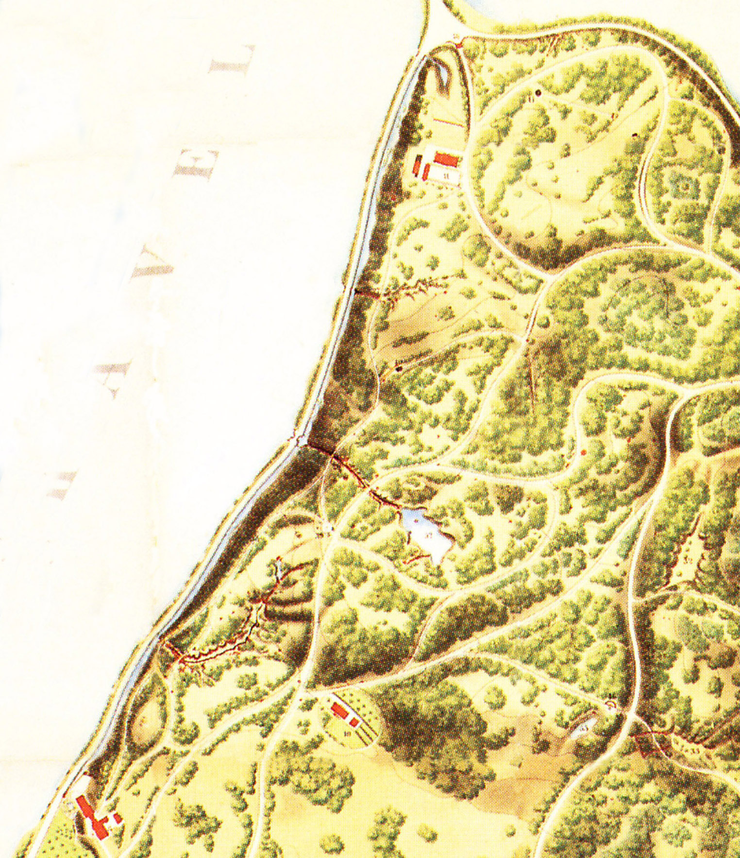 Kraatzplan 1862, Ausschnitt Ufer-Höhenwegs-Partie